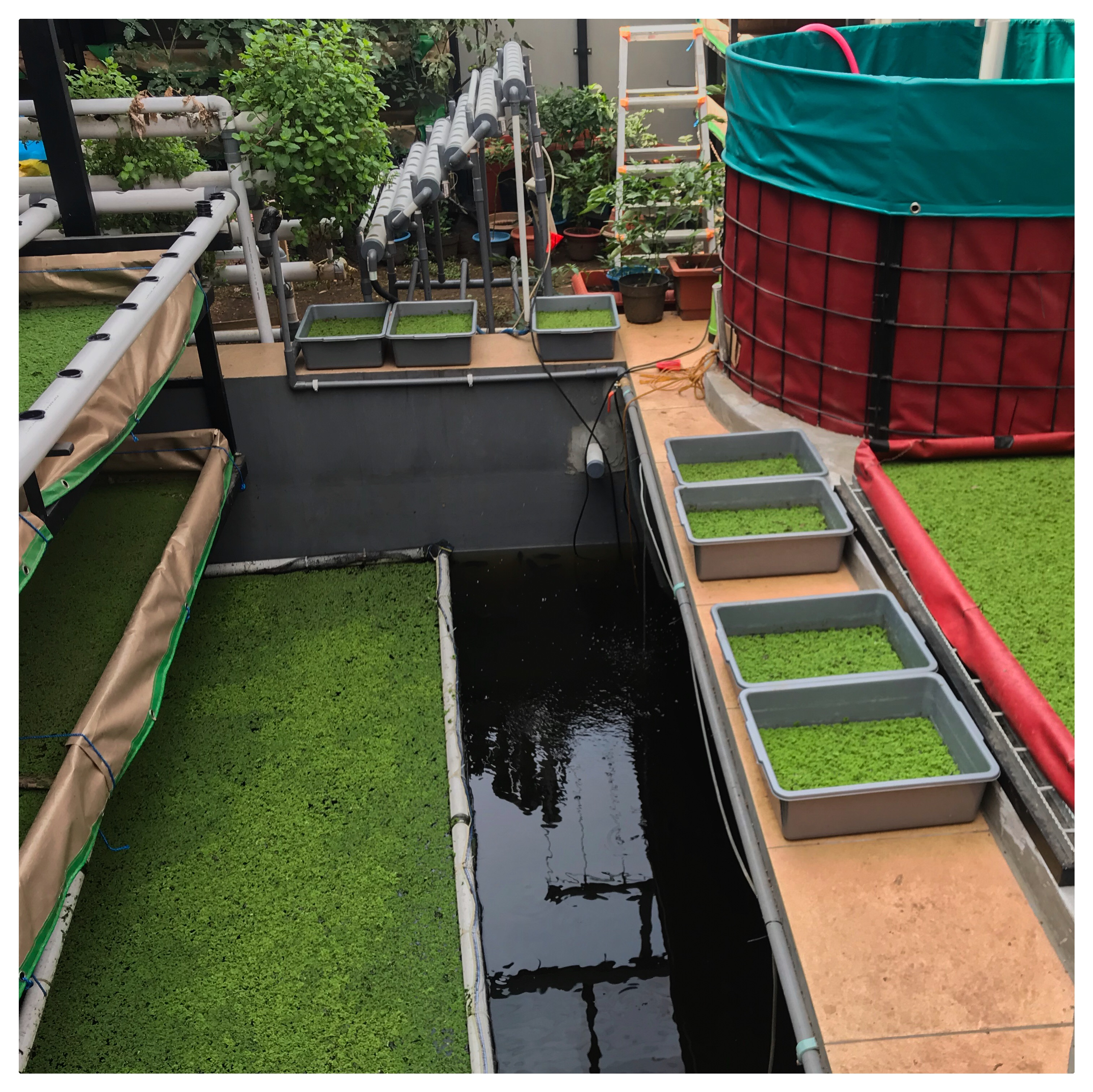 Budidaya azollanpada kolam bertingkat dengan pupik hidroponik ABMix memudahkan perawatan pada lahan sempit, nakjn tetap produktif.